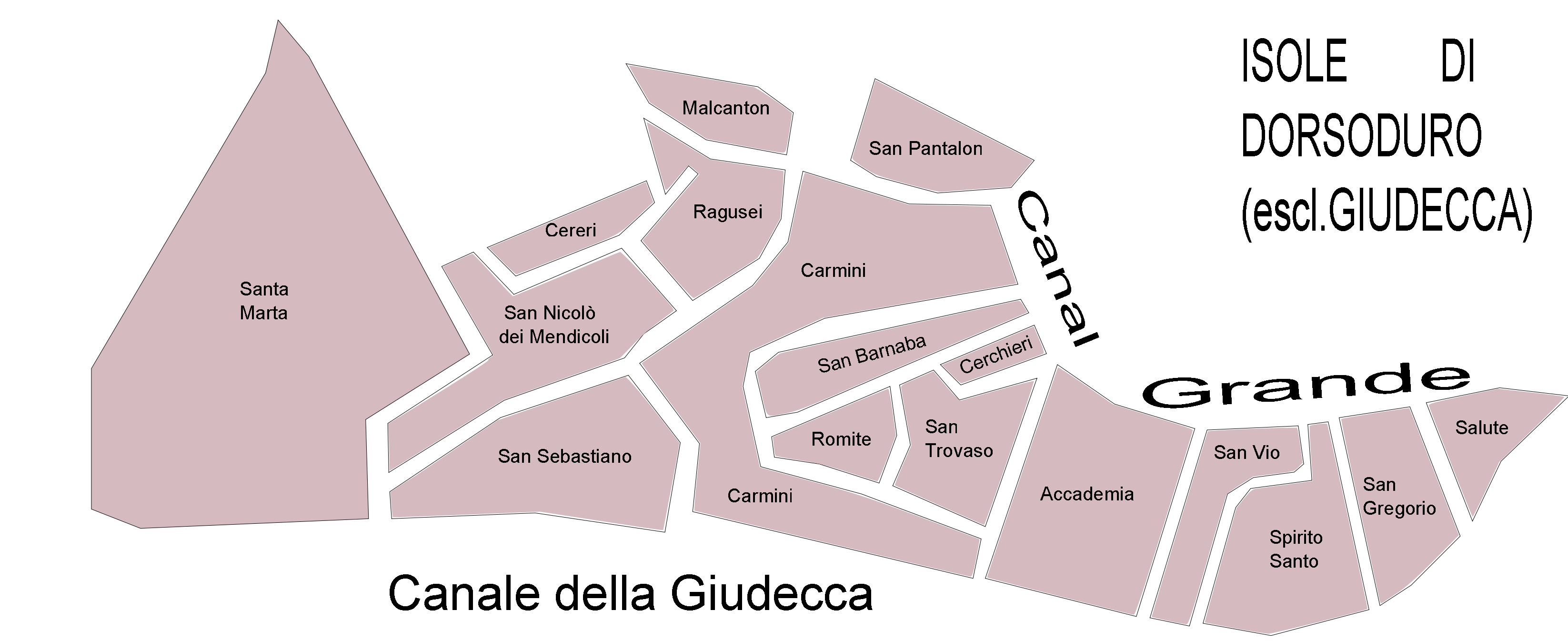 iles du sestiere de dorsoduro venise